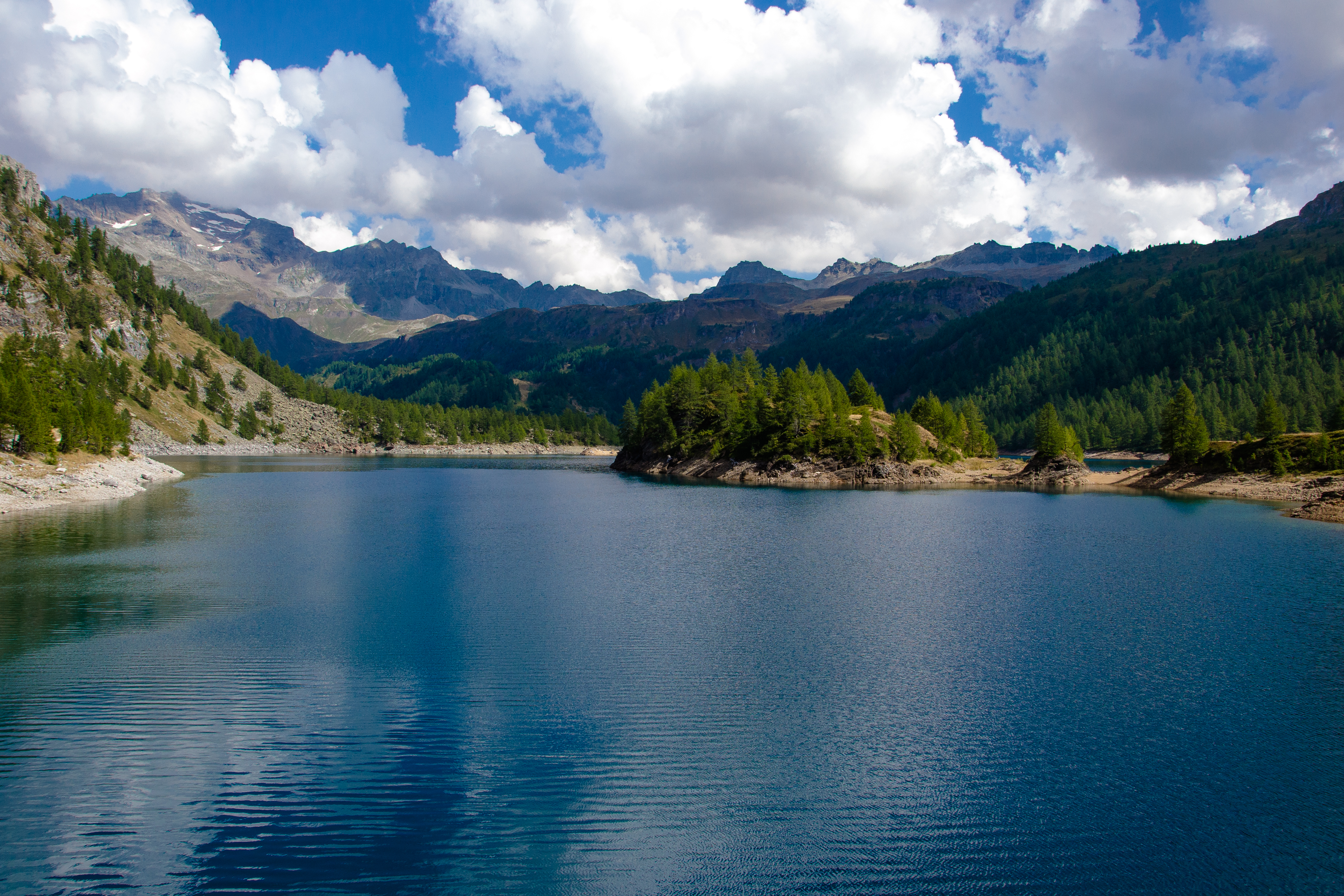 Parco naturale dell'Alpe Veglia e dell'Alpe Devero (Q3364585)